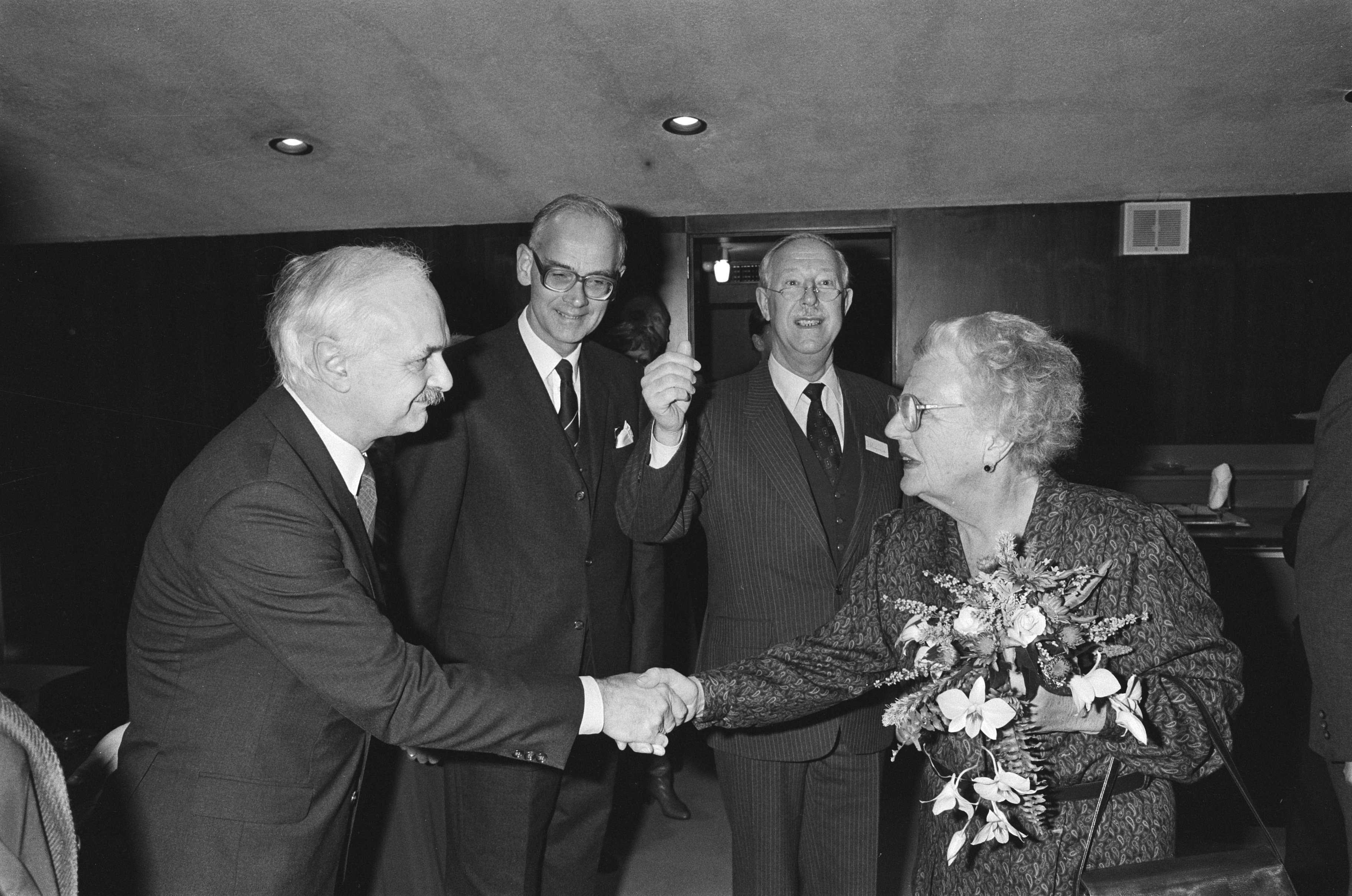 Collectie / Archief : Fotocollectie Anefo Reportage / Serie : [ onbekend ] Beschrijving : Prinses Juliana bij congres Onze Taal; v.l.n.r. prof. Van de Meiden, prof. Drop, dr. J.F. Remarque Datum : 23 november 1985 Trefwoorden : congressen Persoonsnaam : Dr. Remarque, Juliana, prinses, Prof. Drop Fotograaf : Croes, Rob C. / Anefo Auteursrechthebbende : Nationaal Archief Materiaalsoort : Negatief (zwart/wit) Nummer archiefinventaris : bekijk toegang 2.24.01.05 Bestanddeelnummer : 933-4926